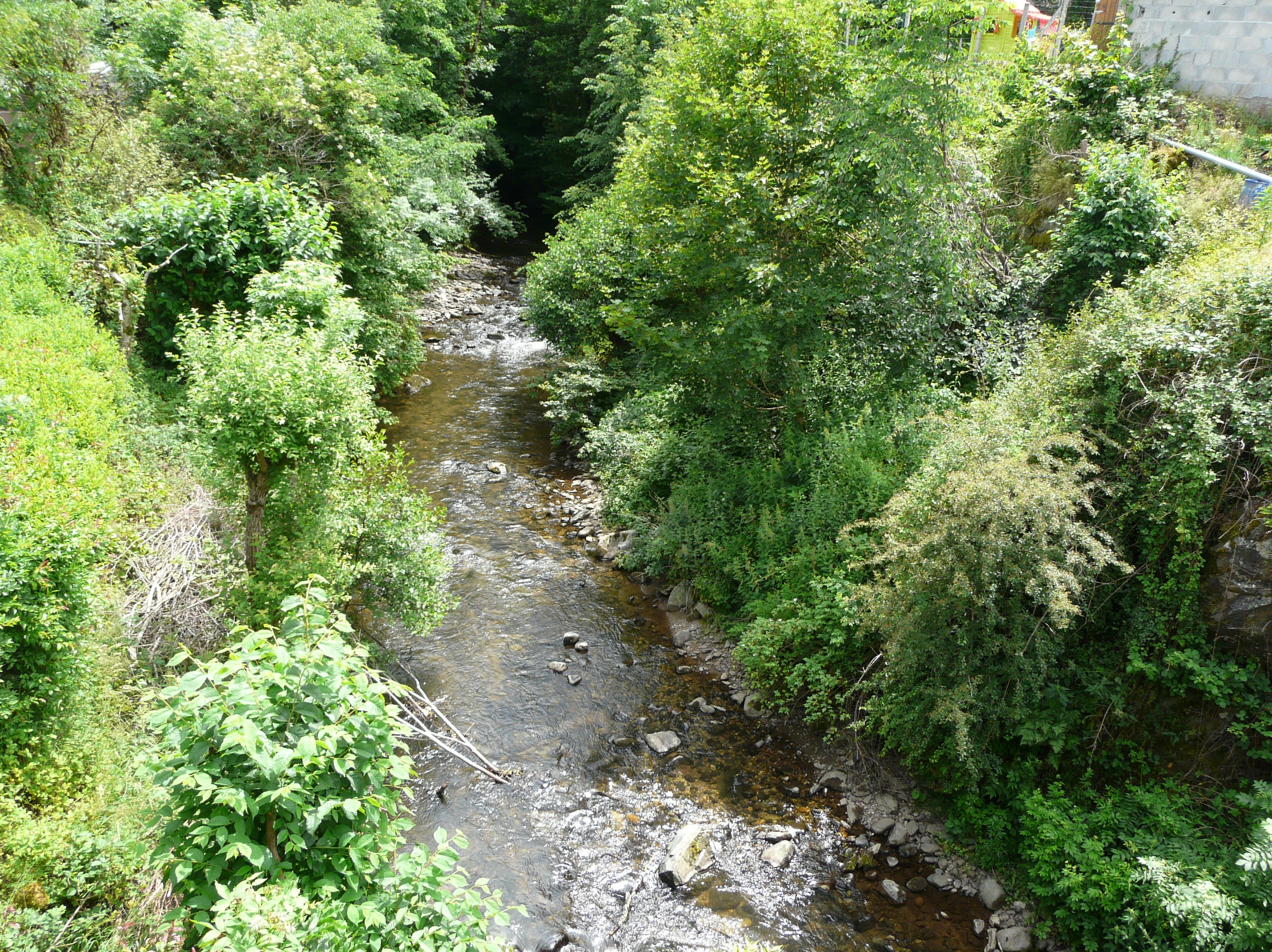 Le Bonjon au sud du lieu-dit le Vernet, en amont de la route départementale 536, Condat, Cantal, France.